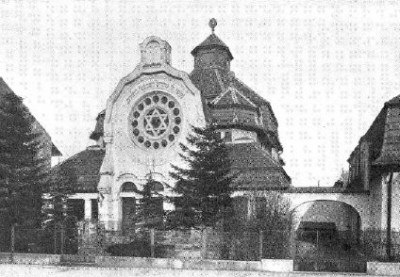 Ehemalige Synagoge Mödling, zerstört Novemberprogrome 1938